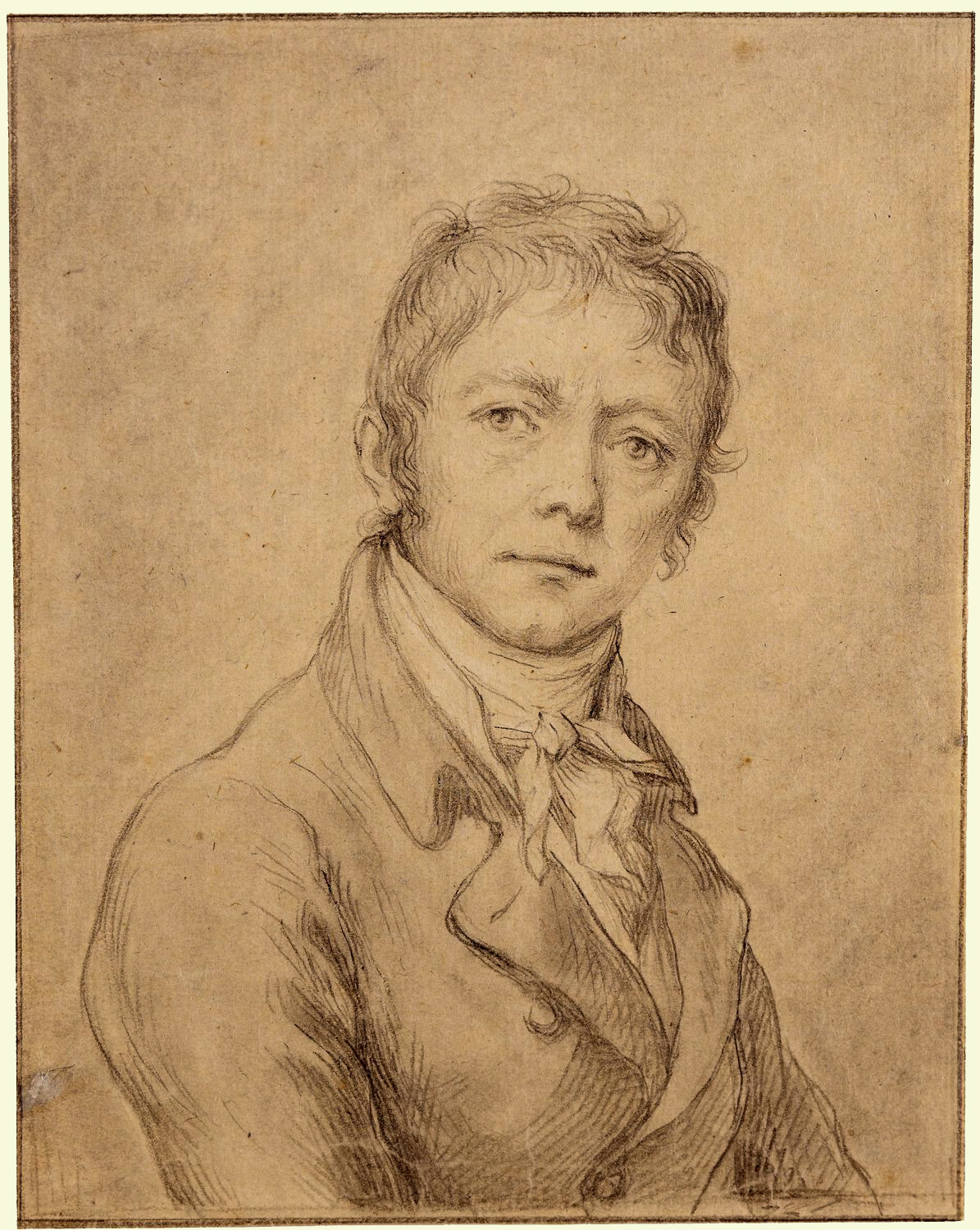 Selbstbildnis